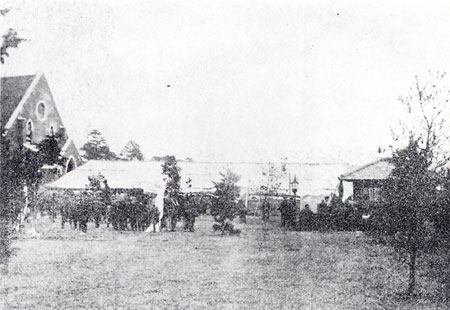 1890年1月27日午後1時から、礼拝堂前の仮説式場で新島襄の告別式が執り行われた。参列者は北垣国道京都府知事をはじめ約4000人。